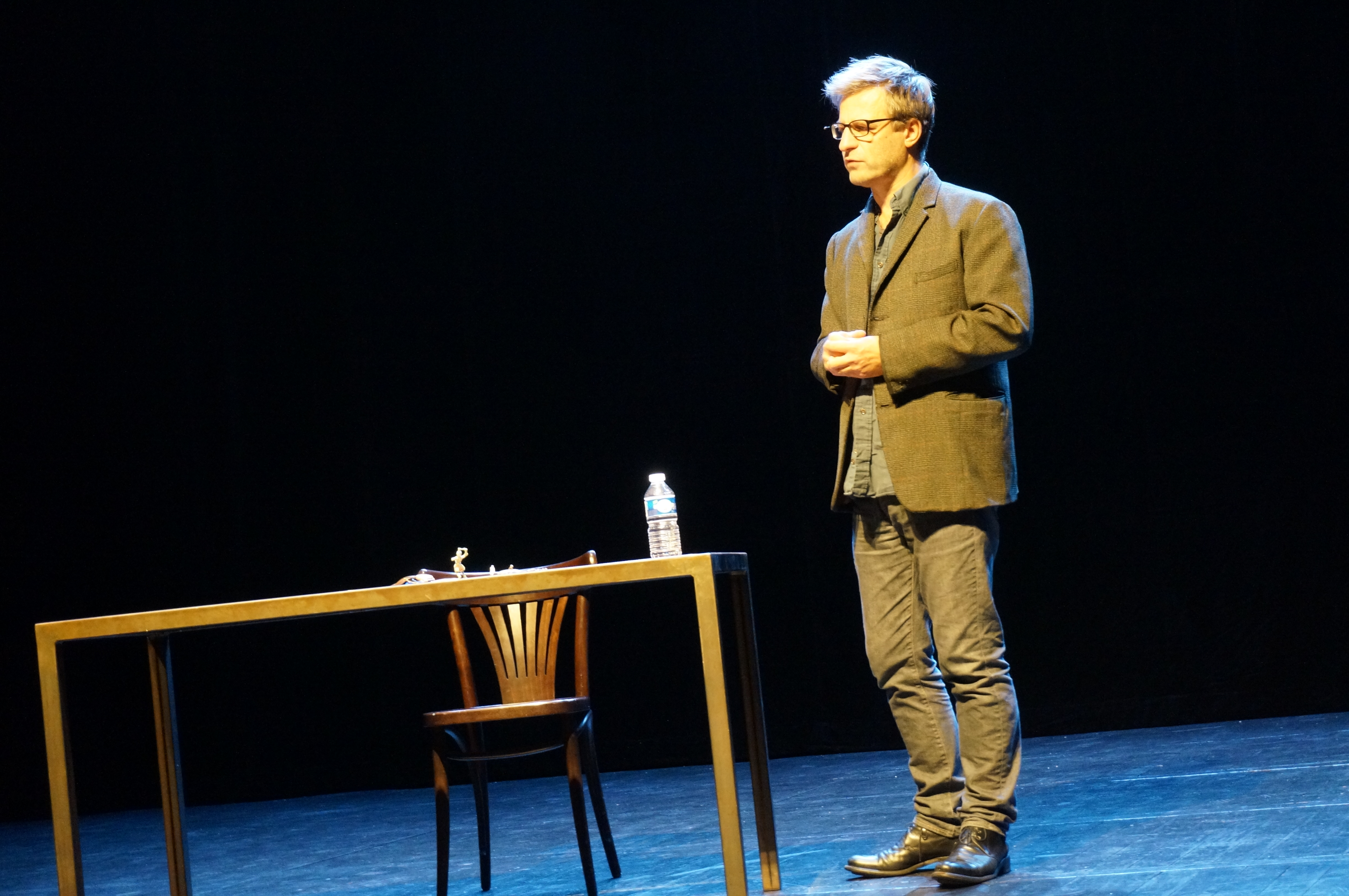 Jean-Yves Jouannais à la Comédie de Reims.